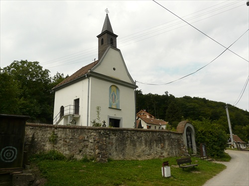 Kostol v dedine Pila (okr. PK)